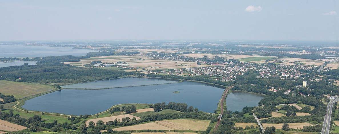 Widok na stawy znajdujące się w gminie Goczałkowice-Zdrój